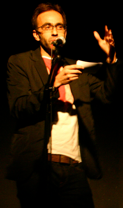 Harkaitz Cano 2011n